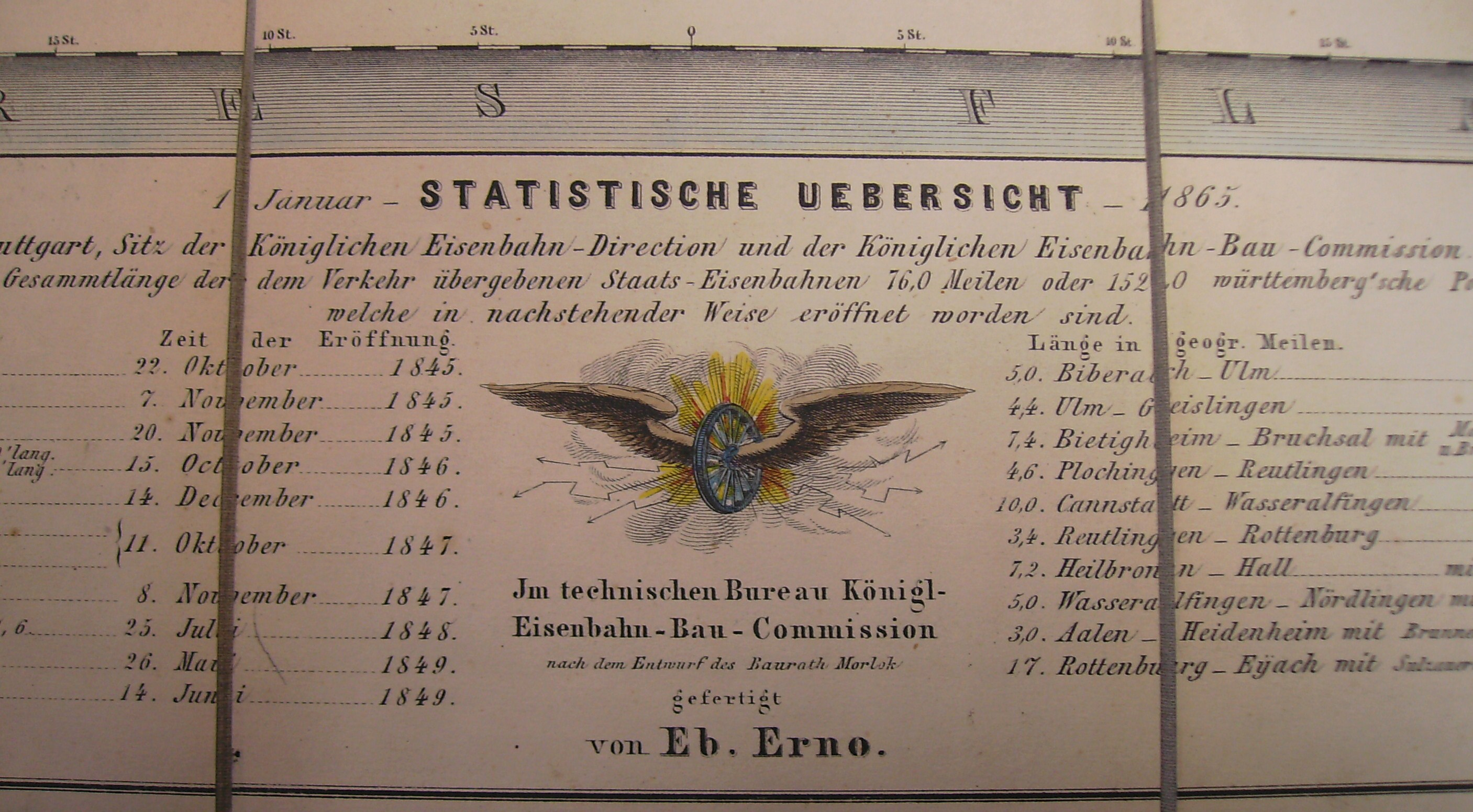 Impressum der Höhenkarte der K. Württemberg'schen Staatseisenbahnen. Statistische Übersicht mit zahlreichen Legenden. Angaben in Meilen, Württ. Fuß und Pariser Fuß. Stuttgart: Kgl. Eisenbahn-Direction & Kgl. Eisenbahn-Bau-Commission, 1865 (Faltkarte, auf Leinen gezogen, im Original-Schuber, teilkoloriert)